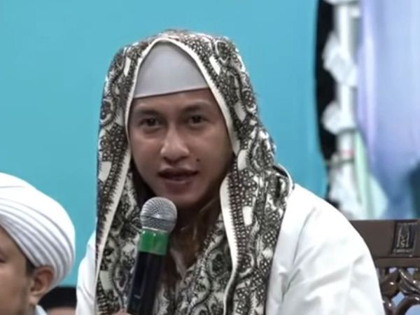 Habib Bahar bin Smith saat mengisi ceramah di acara haul ke 82 Habib Salim bin Hamid Al-Kaff, Kubah Nagasari, Banjarmasin